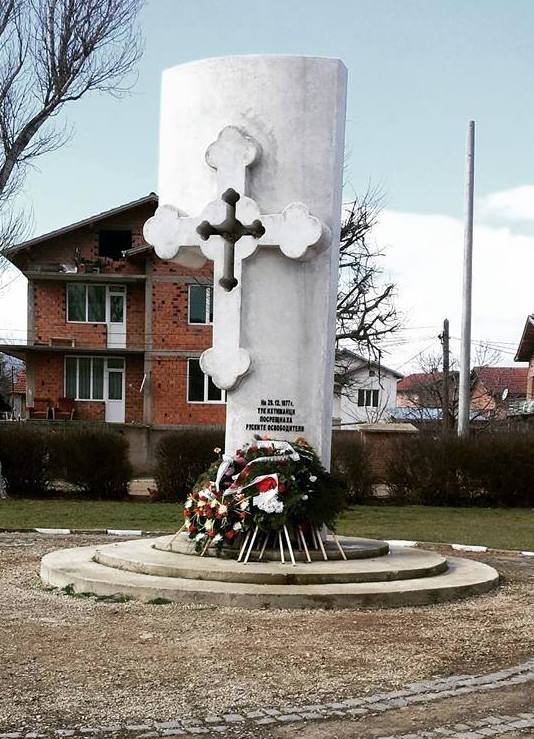 Паметен кръст и параклис на мястото на посрещането на руските войски в гр. Ихтиман на 29 декември 1877 г.